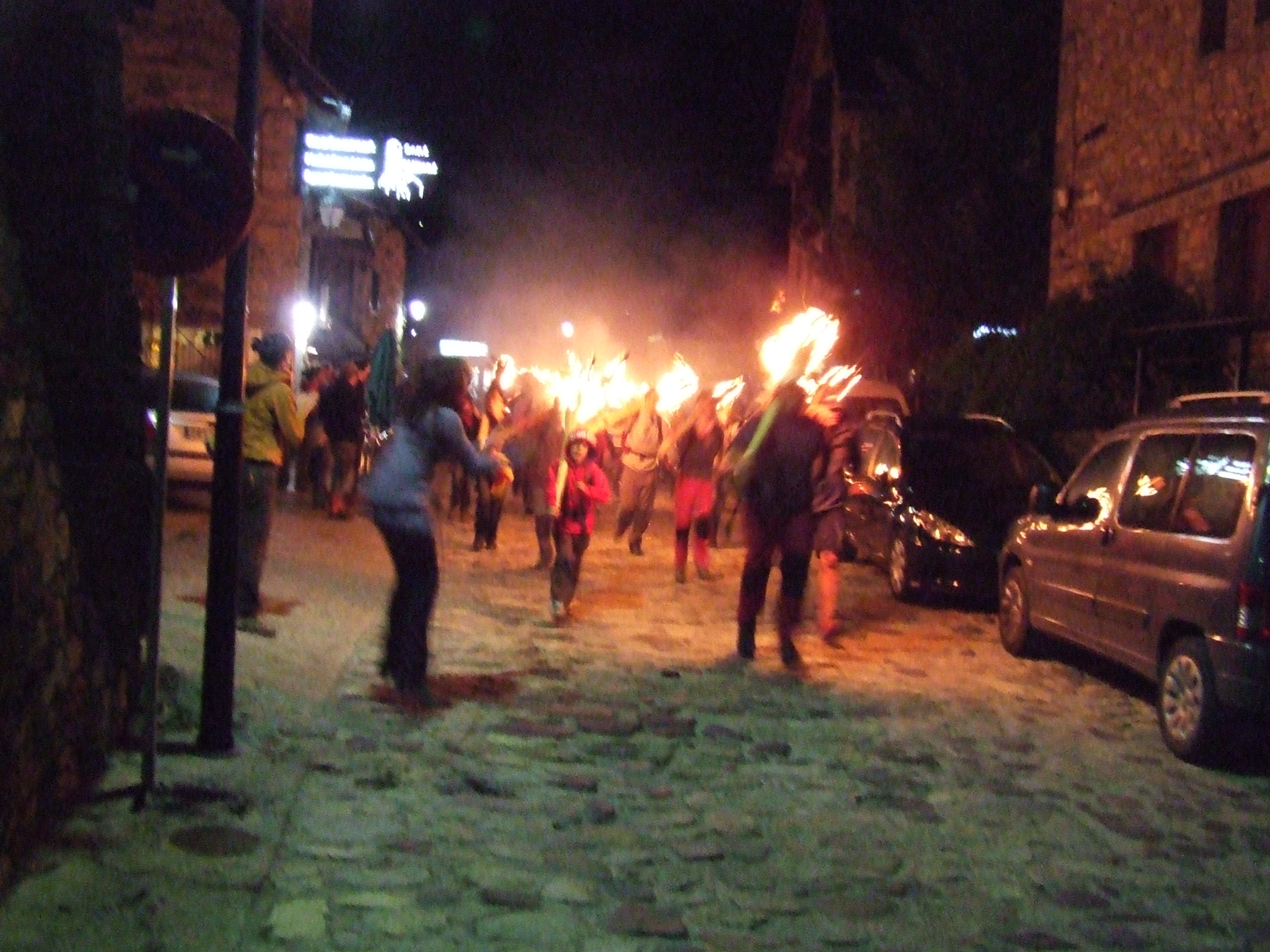 Les Falles de Taüll, 2009 (Vall de Boí, Alta Ribagorça)